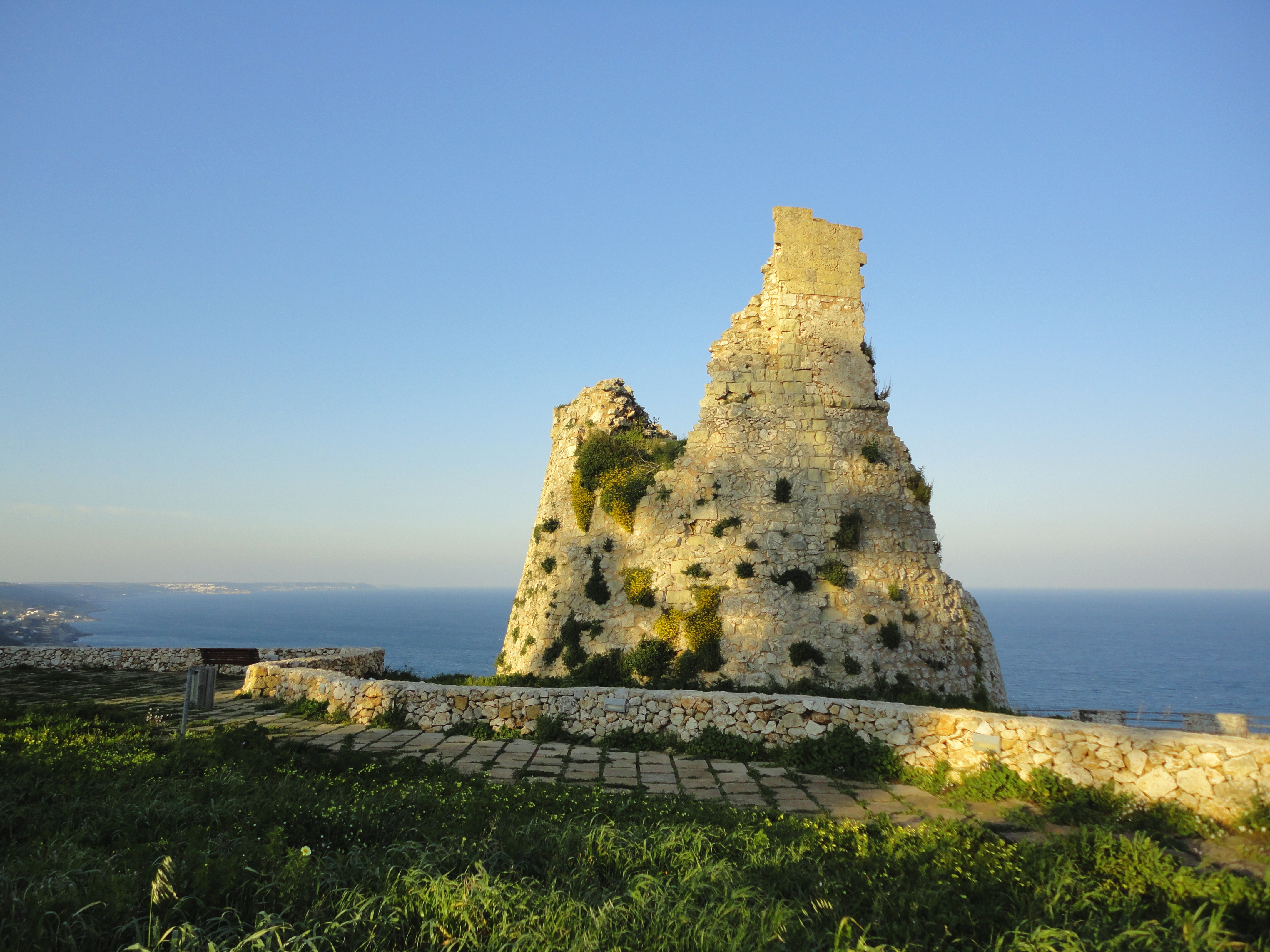 Torre Nasparo Marina di Tiggiano, Lecce